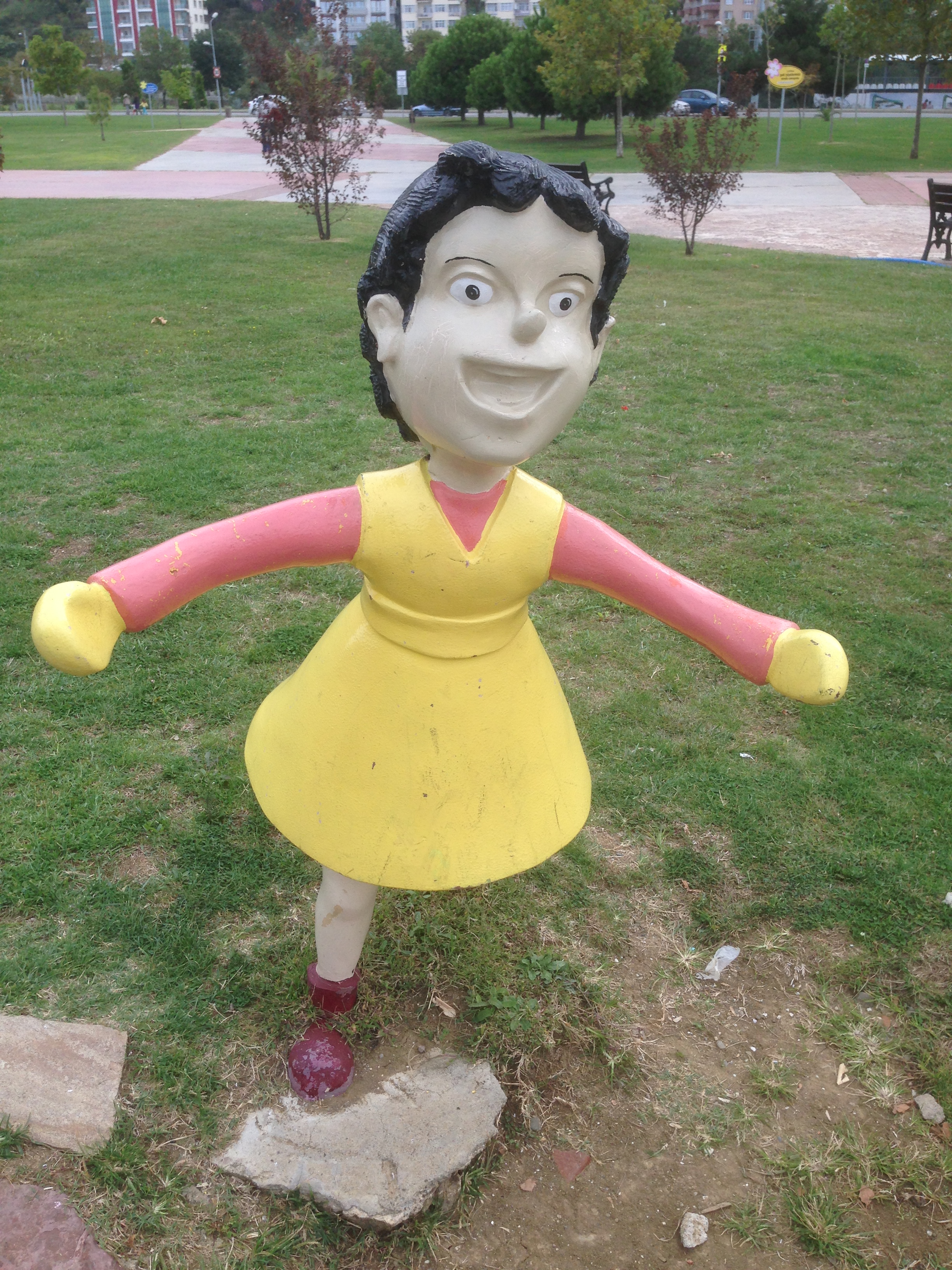 Samsun'dan çeşitli görüntüler